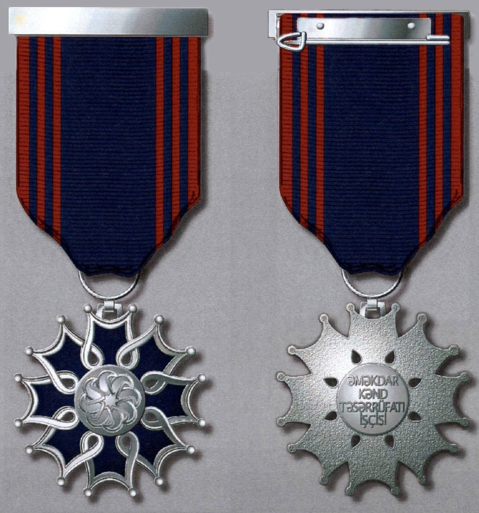 “Əməkdar kənd təsərrüfatı işçisi” fəxri adının döş nişanı